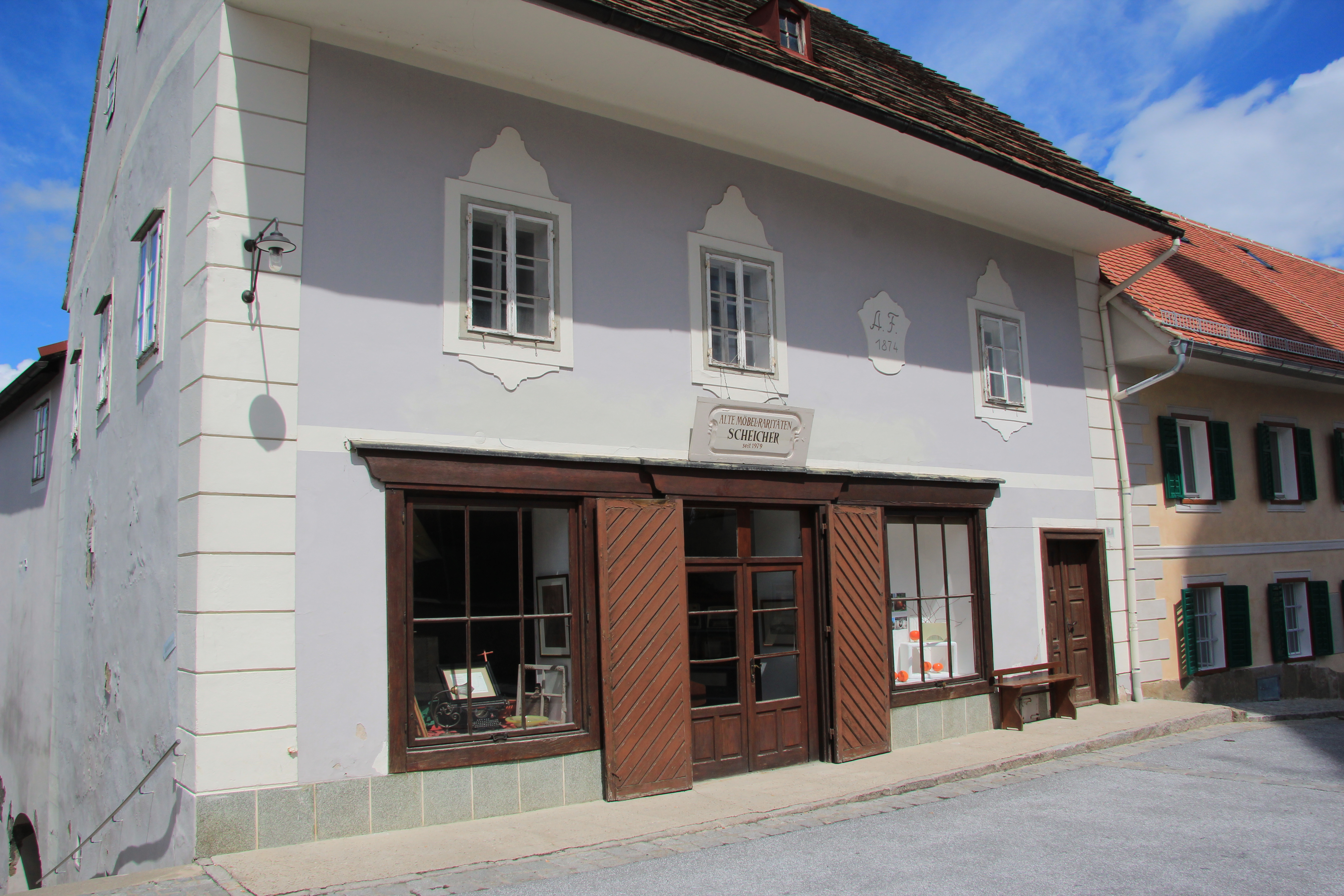 Eindrücke aus Straden, Südoststeiermark